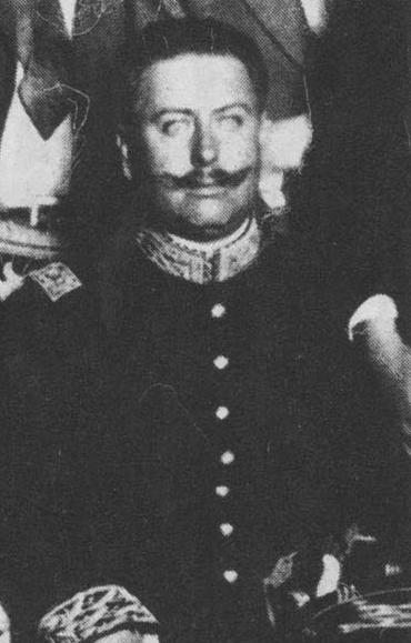 El general Jacinto B. Trevino.